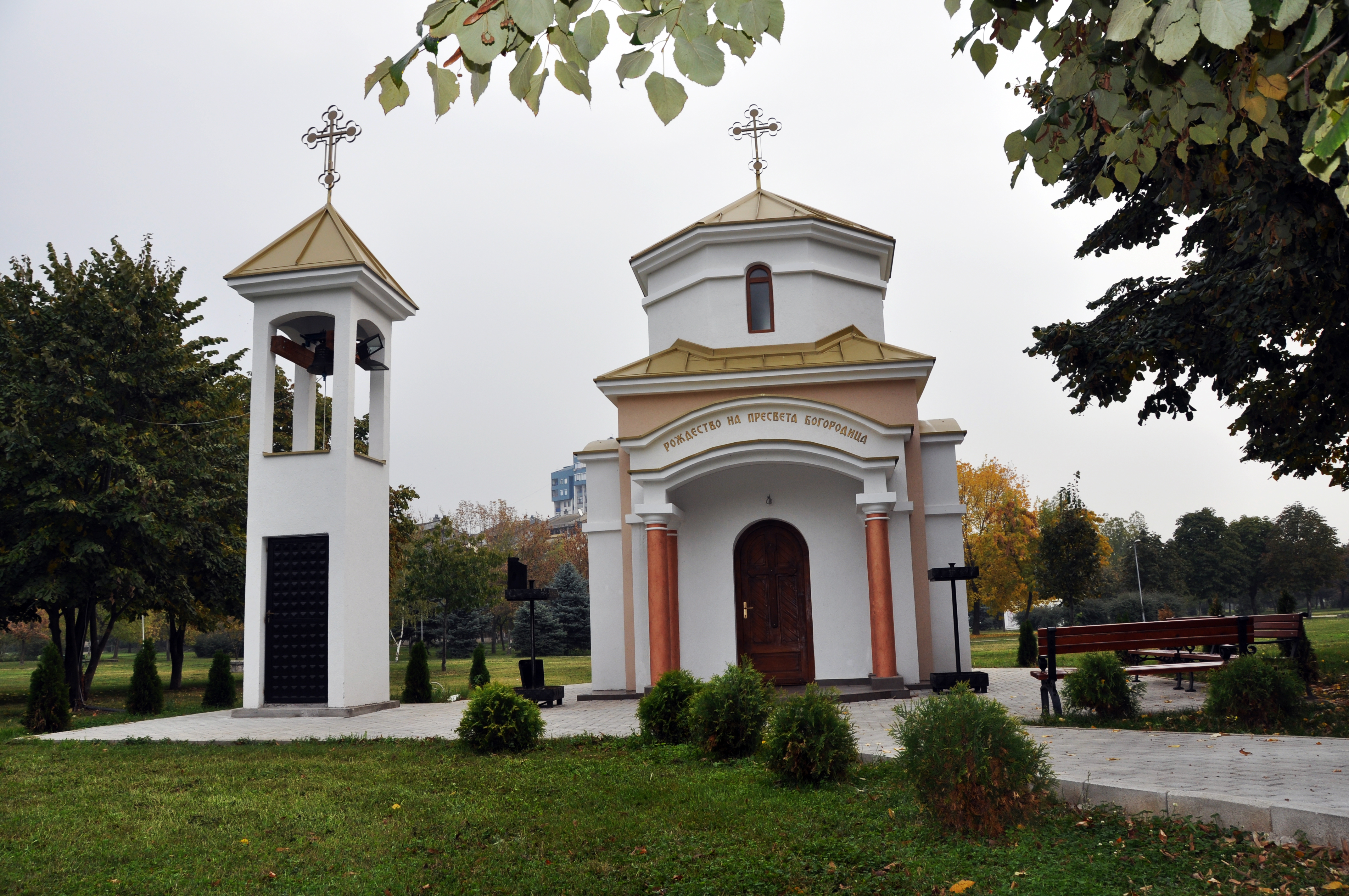 Св, Рождество на ПРЕСВЕТА БОГОРОДИЦА населба Аеродром Скопје